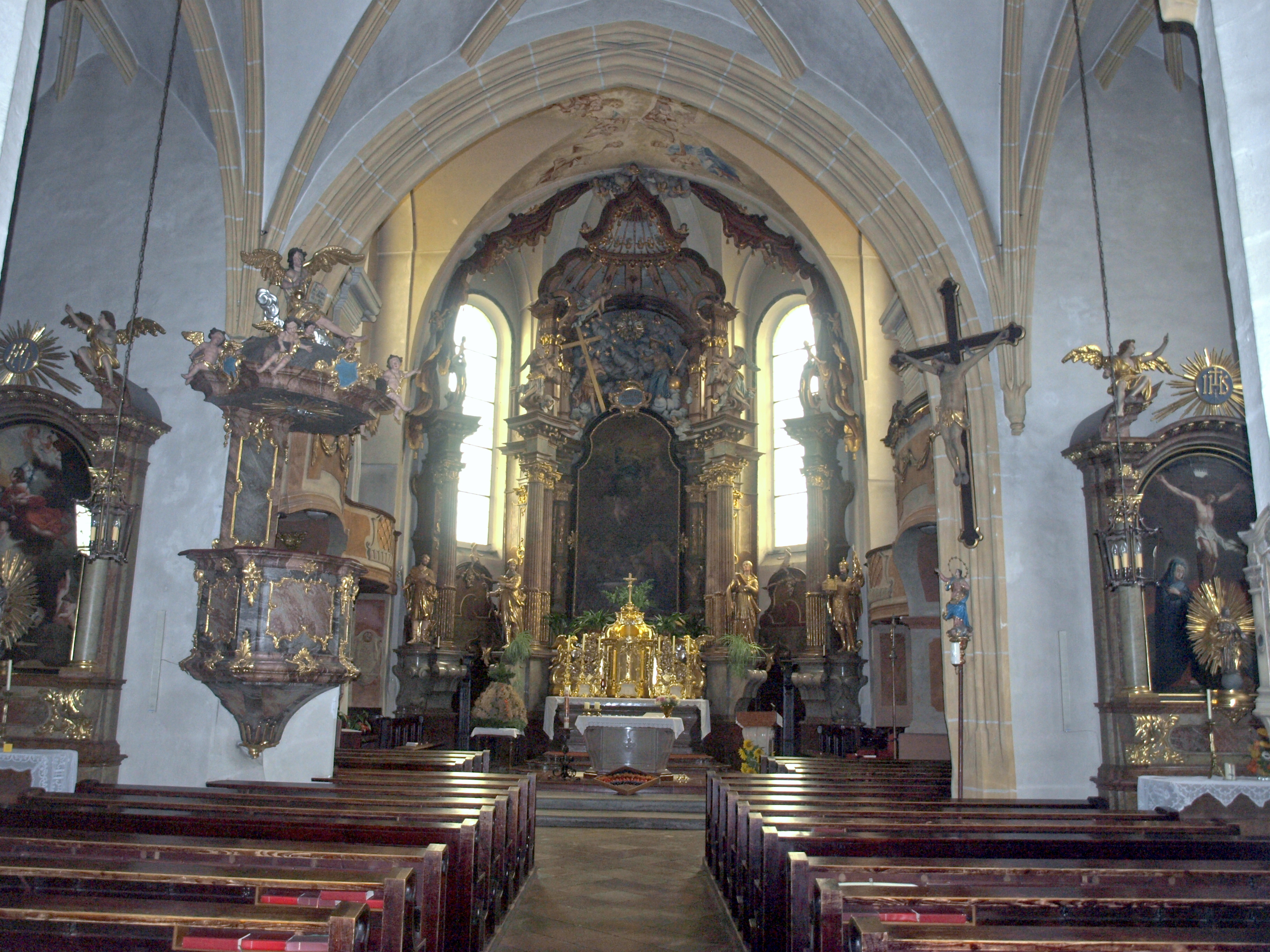 Kath. Pfarrkirche Mariae Himmelfahrt